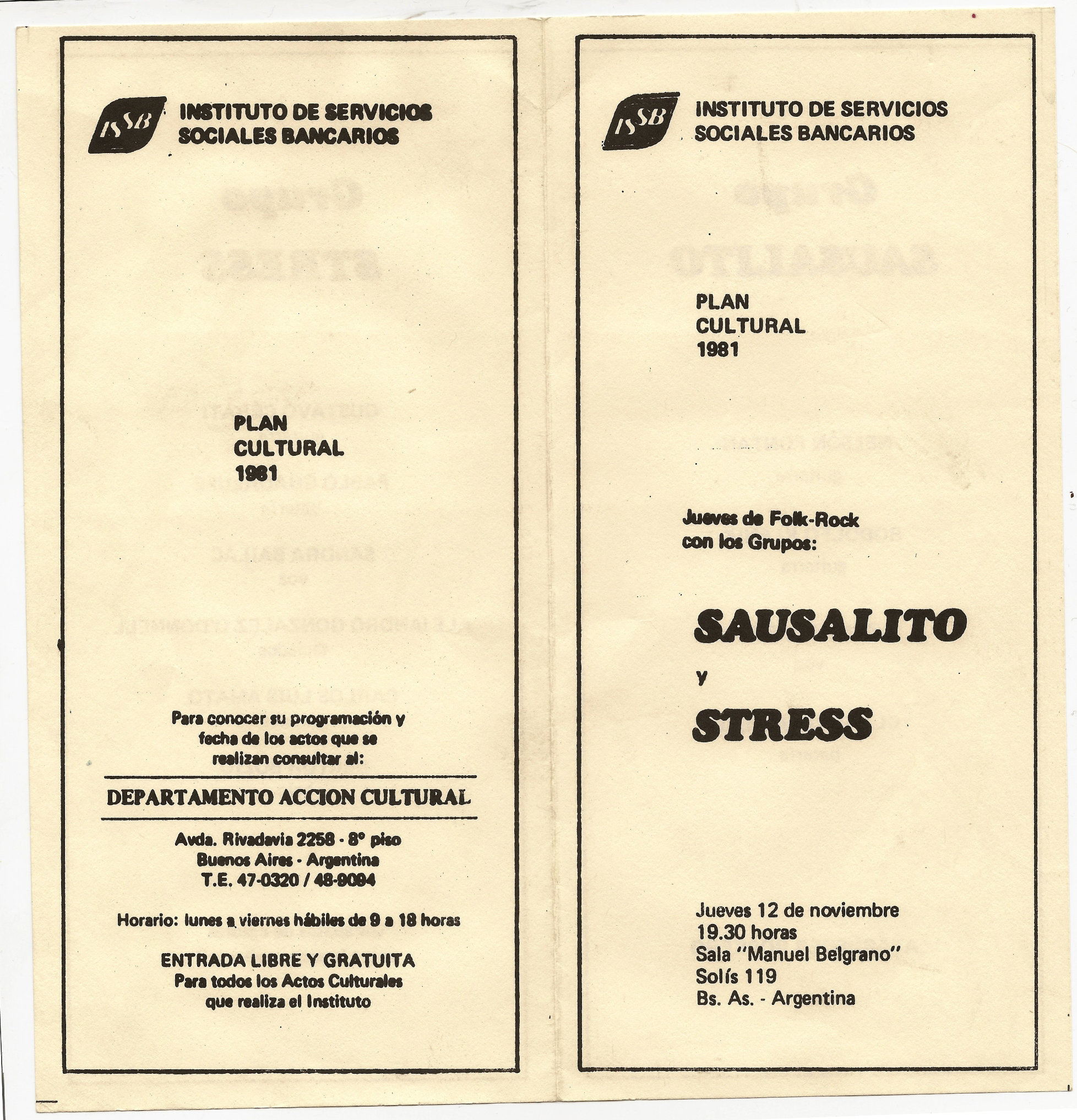 Programa de noviembre 1981 Grupo Stress